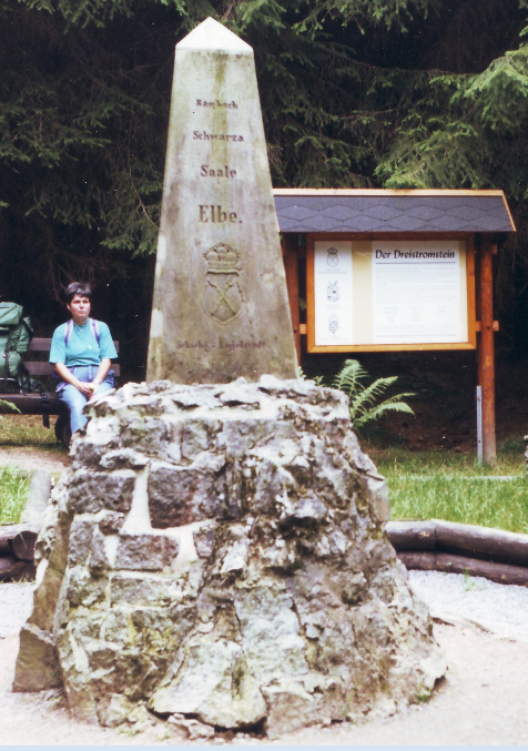 Dreistromstein